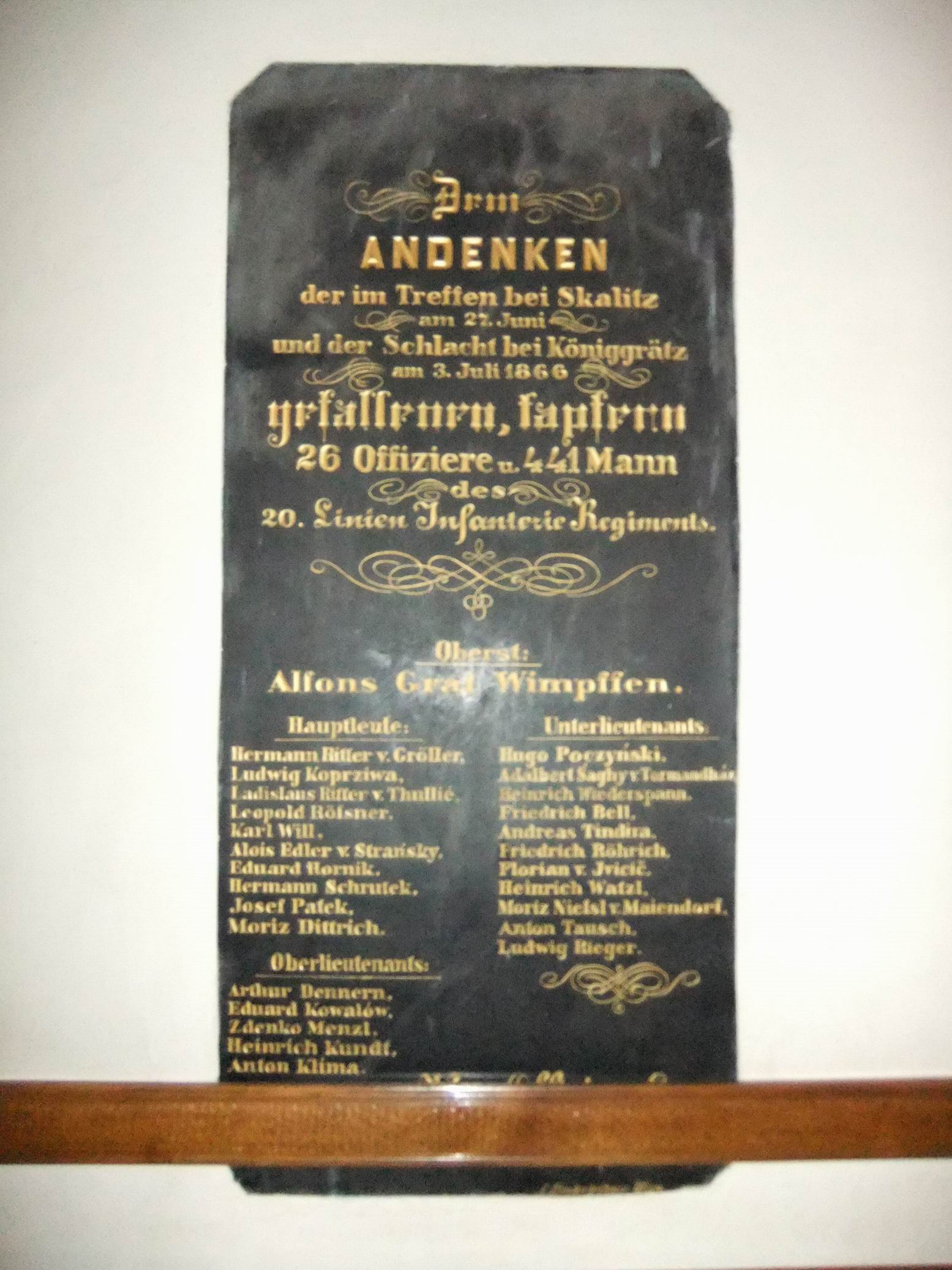 Alfons Graf von Wimpffen - tablica pamiątkowa w Nowym Sączu